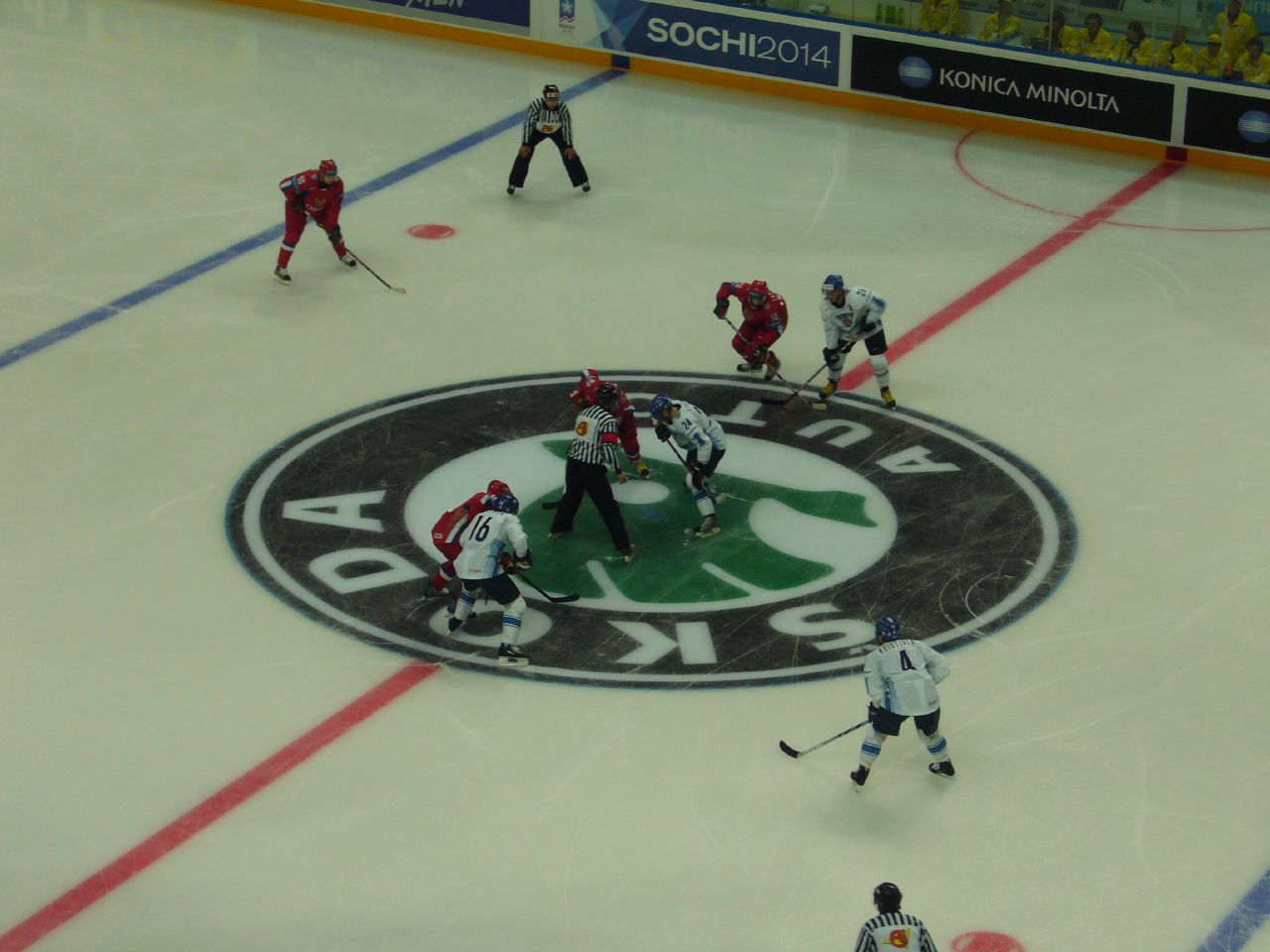 Semifinal Russia vs. Finland 1:2 OT; Khodynka Arena